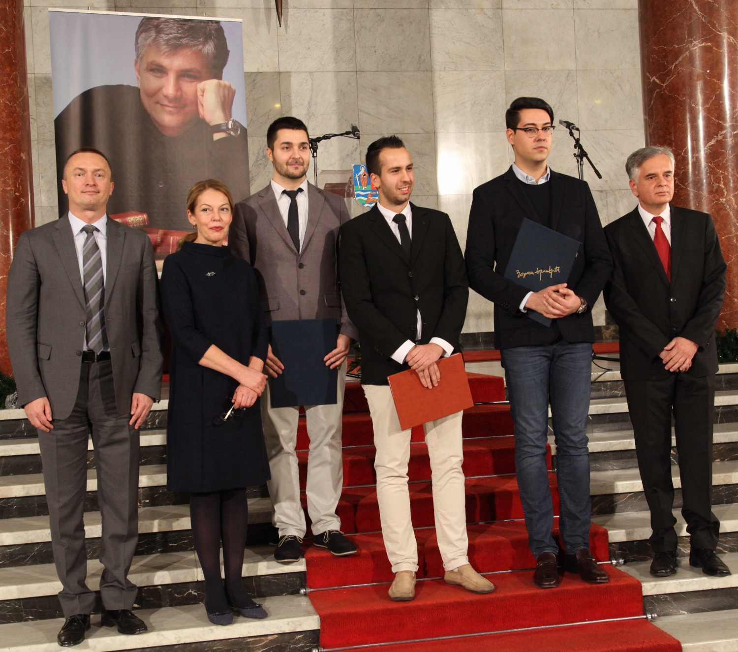 Srpskohrvatski / српскохрватски: Sa ceremonije dodele Nagrade 23. decembra 2015. u centralnom holu zgrade Pokrajinske Vlade AP Vojvodine